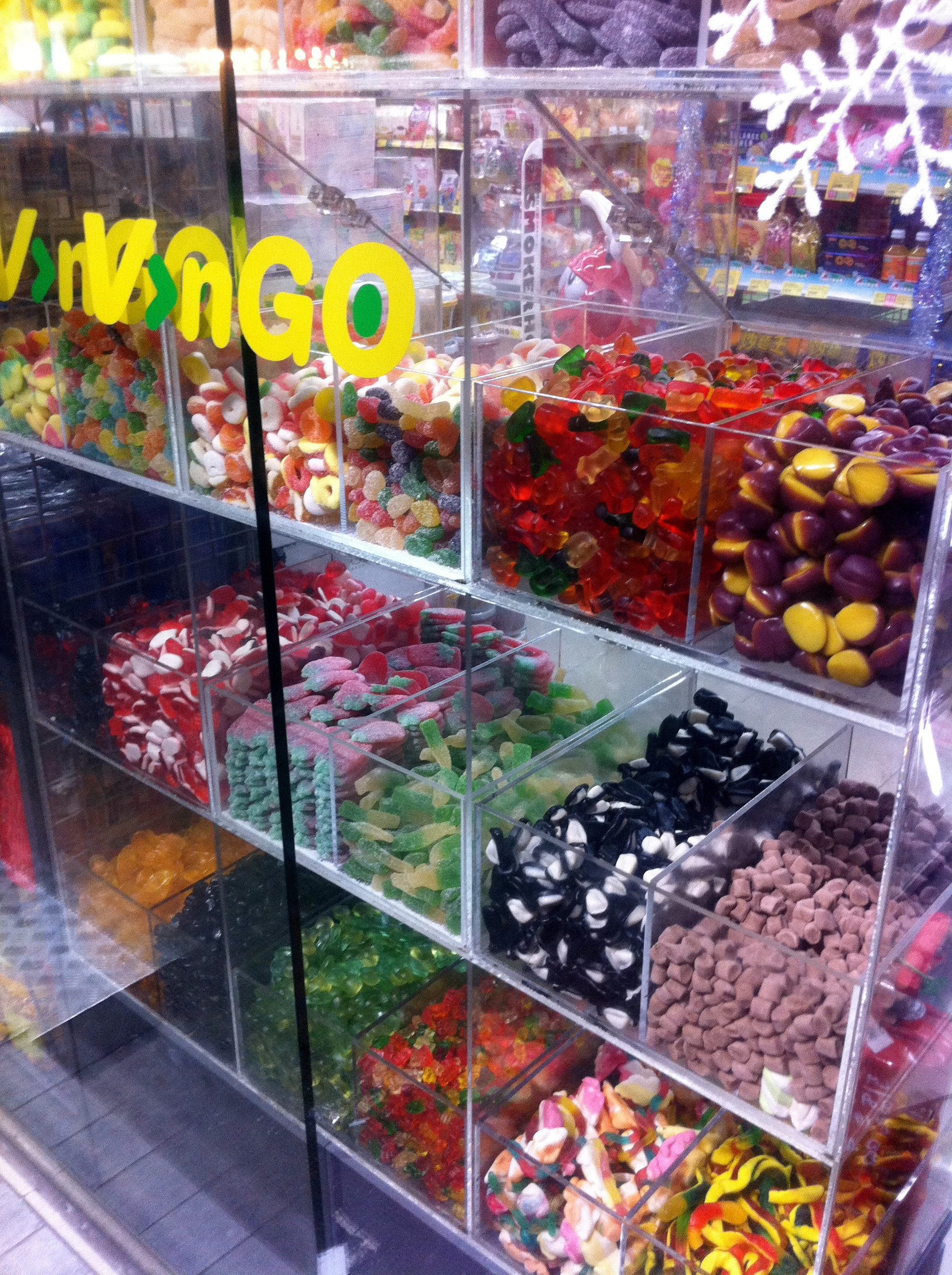 中文（香港）: 堅尼地城 糖米店